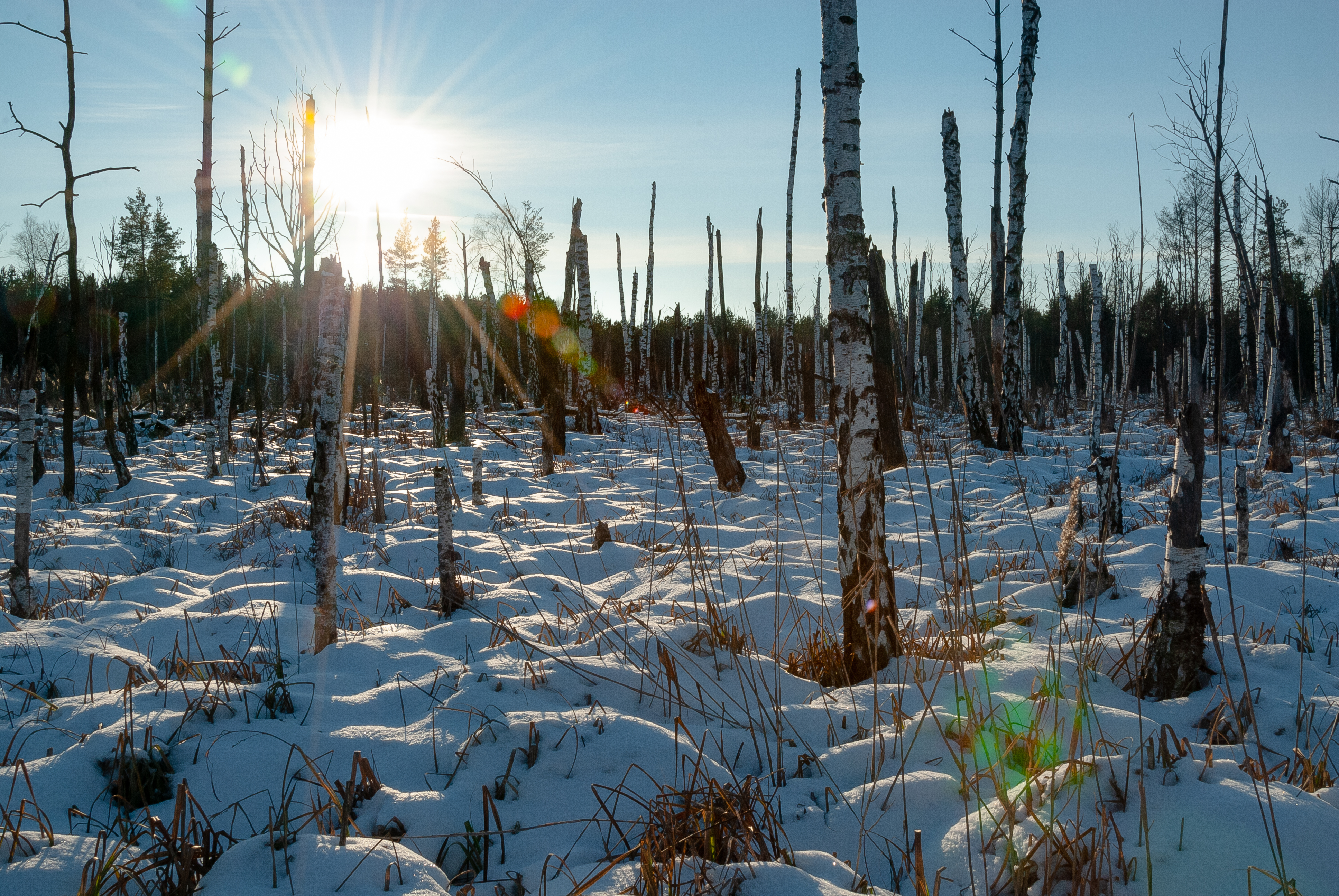 "Болото Біле", Бориспільський район, Природно-заповідний фонд Київської області, Сошниківська сільська рада